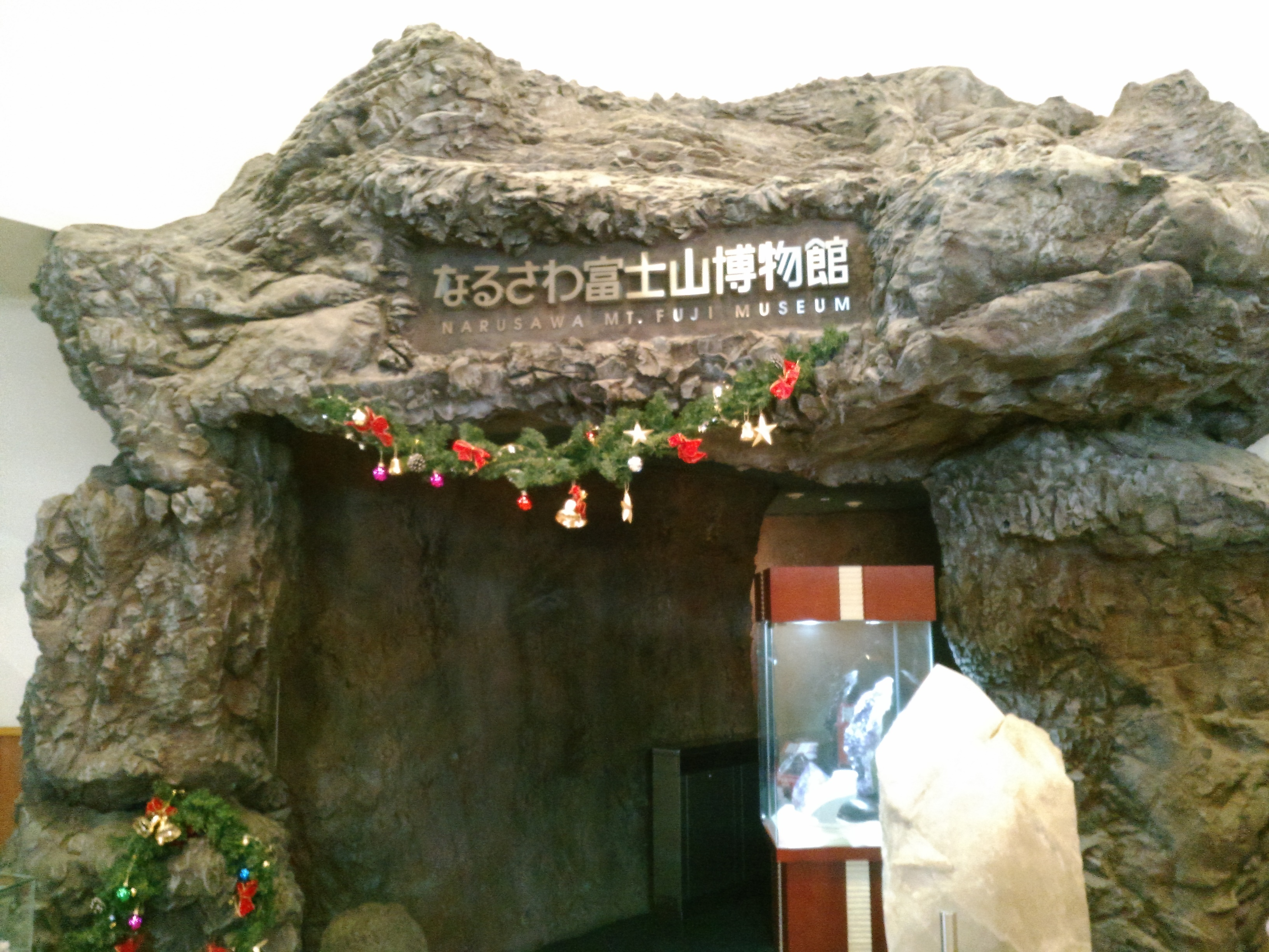 なるさわ富士山博物館 - 入り口